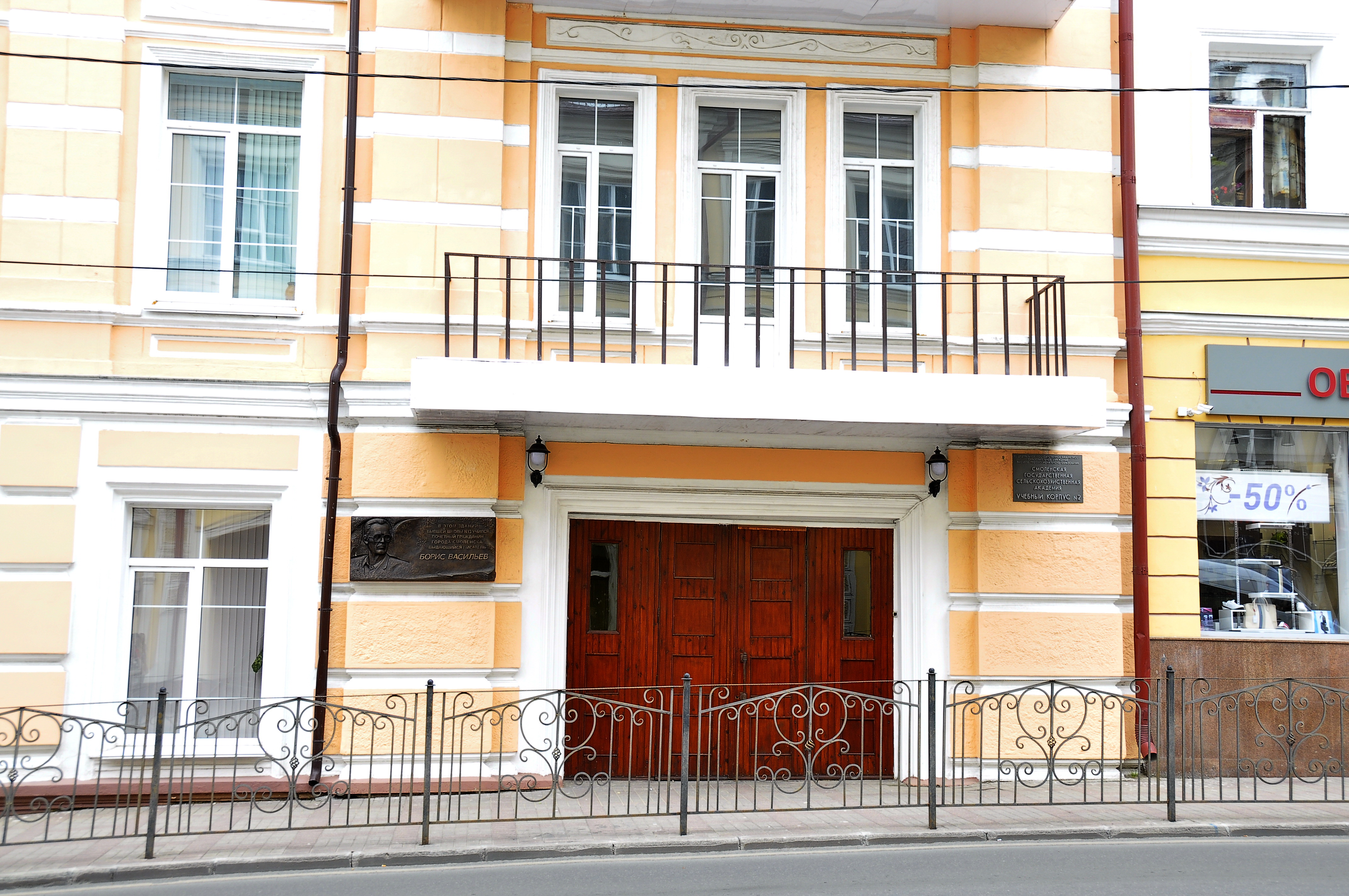 Смоленская государственная сельскохозяйственная академия